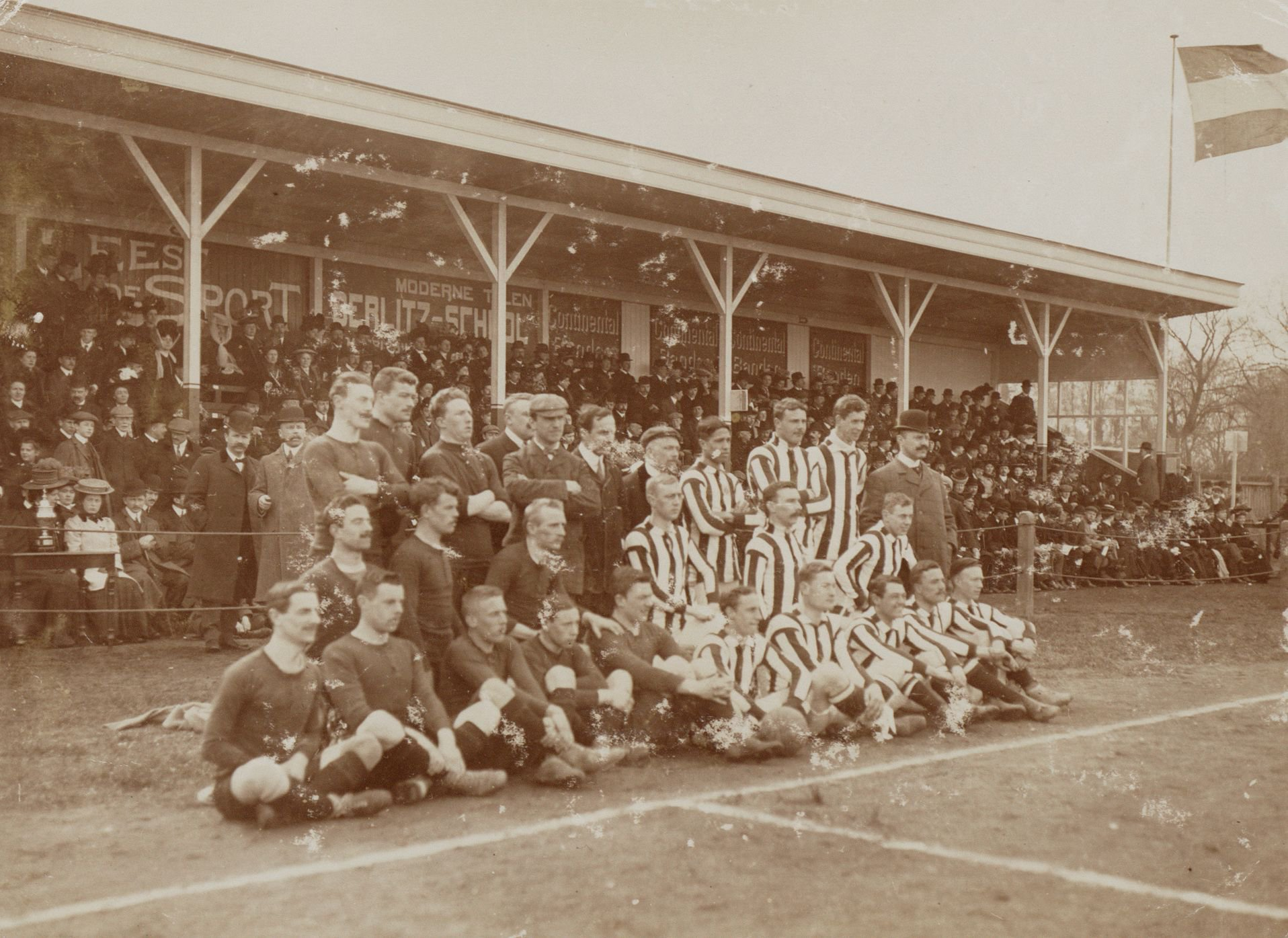 Nederlands elftal en Belgisch elftal poserend voor de interland Nederland-België. Nederlands elftal, staand van links naar rechts: Karel Heijting, Reinier Beeuwkes, Louis Otten en Hirschmann (NVB, met bolhoed). Zittend, middelste rij: Kees Bekker, Bok de Korver en Noud Stempels. Zittend, voorste rij: Caius Welcker, Edu Snethlage, Jan Akkersdijk, Jan Thomée en Herman Jurgens. Nederland - België (3-1), gespeeld op 26 april 1908 op het Sparta-terrein te Rotterdam. Opstelling: Reinier Beeuwkes (DFC), Karel Heijting (HVV, aanvoerder), Louis Otten (Quick den Haag), Kees Bekker (HBS), Bok de Korver (Sparta), Noud Stempels (Quick den Haag), Caius Welcker (Quick den Haag), Edu Snethlage (Quick den Haag), Jan Akkersdijk (Velocitas Breda), Jan Thomée (Concordia) en Herman Jurgens (Sparta). Voor België speelden: Henri Leroy, Roger Piérard, Edgard Poelmans, Guillaume Van den Eynde, Charles Cambier, Camille van Hoorden, Maurice Tobias, Jules Suetens, Robert de Veen, Louis Saeys, Georges Hebdin, Georges Mathot.